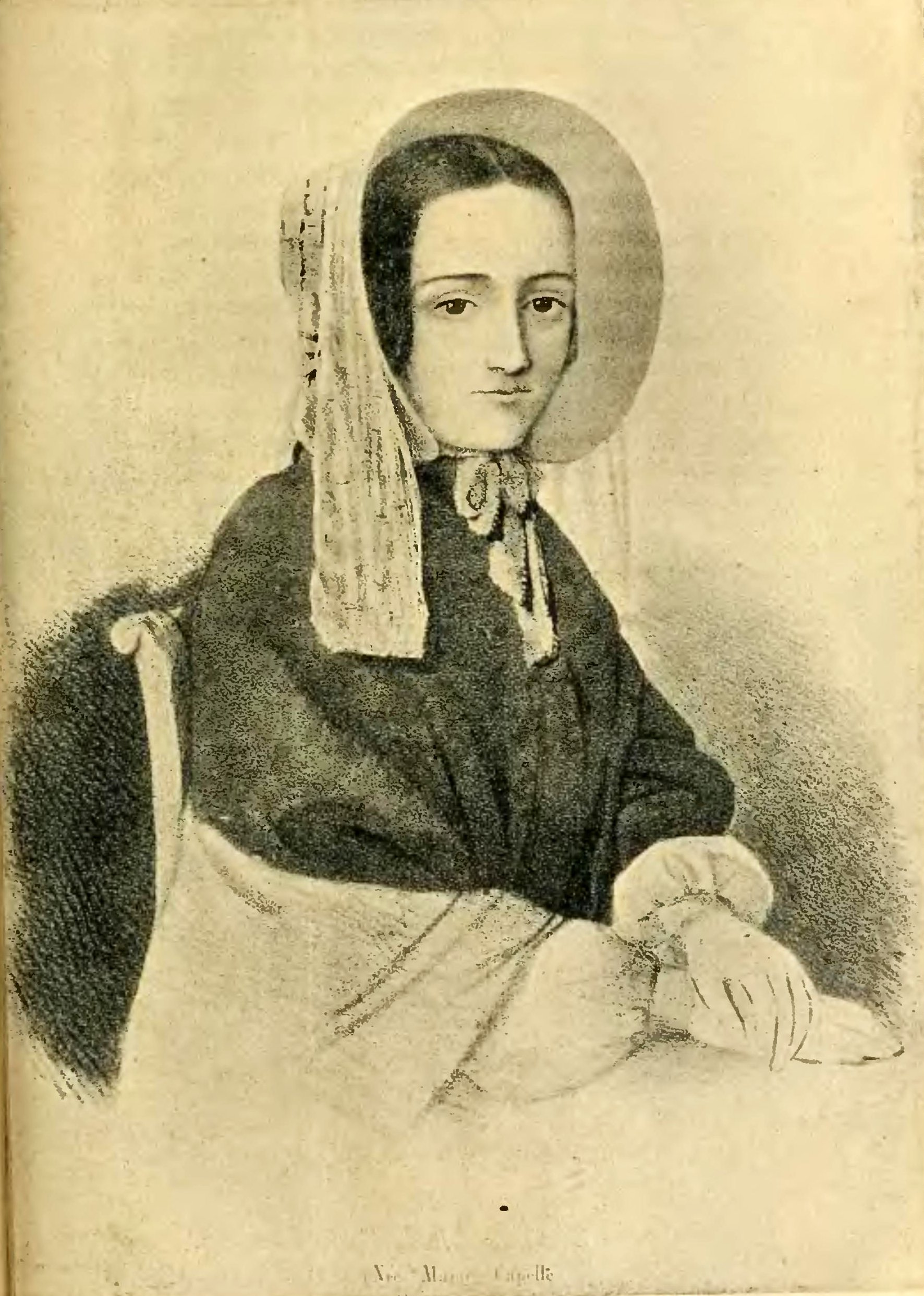 Histoire socialiste sous la direction de Jean Jaurès 1908, Volume 8, Le règne de Louis-Philippe, illustration page 421